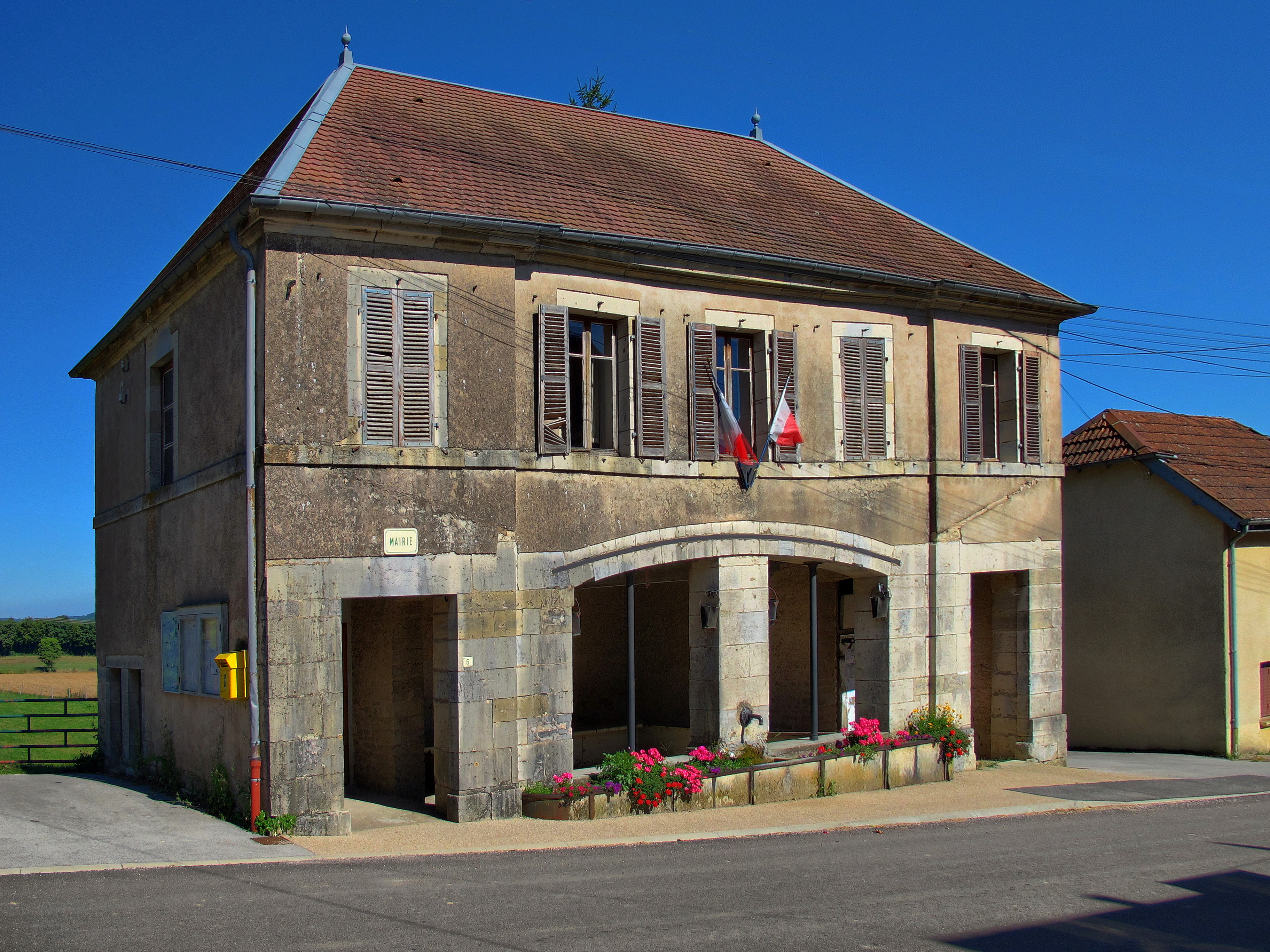 L'ancienne mairie-lavoir, désormais mairie seulement.